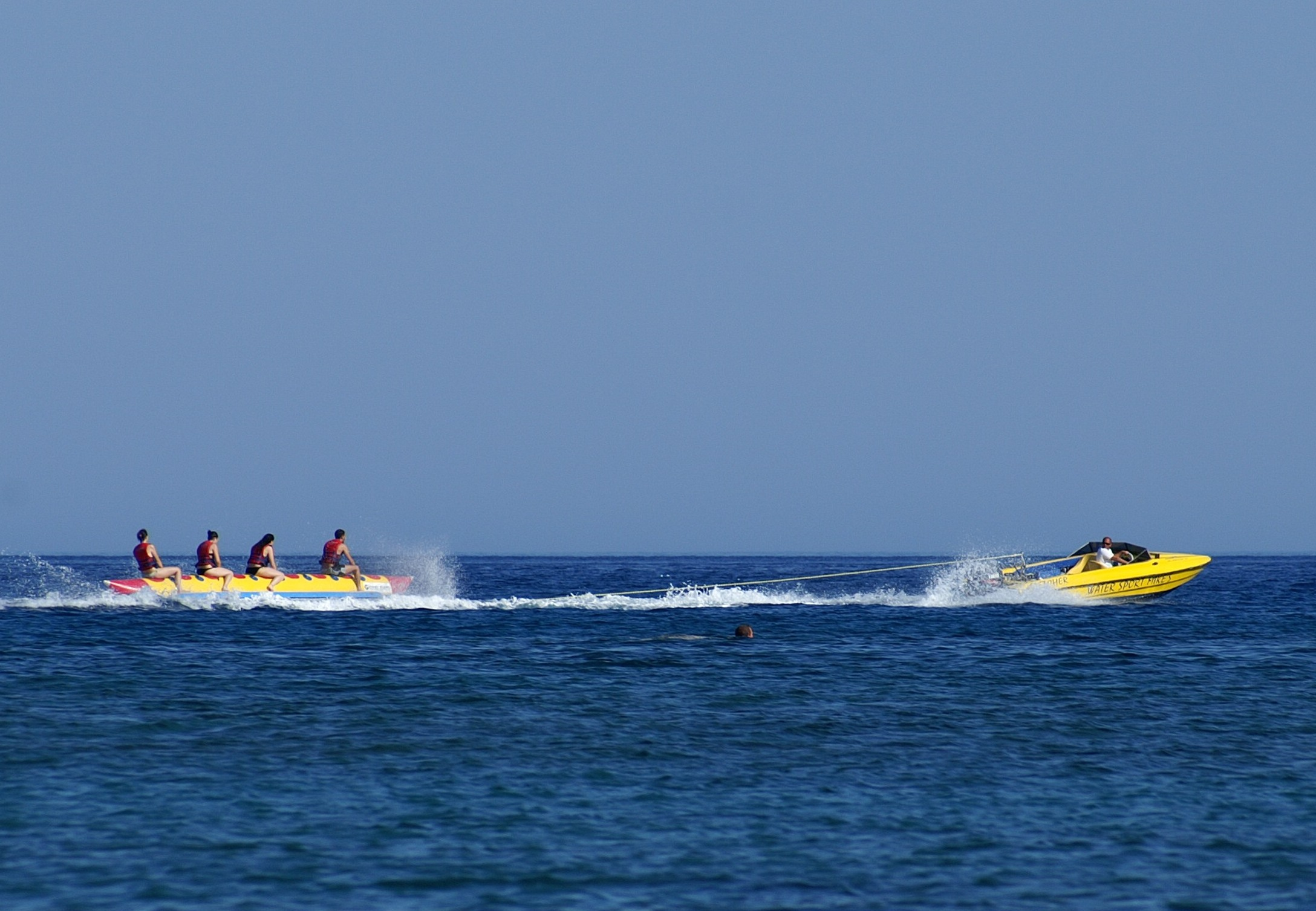 Wassersport mit einem Bananenboot am Strand von Kolymbia in Rhodos.